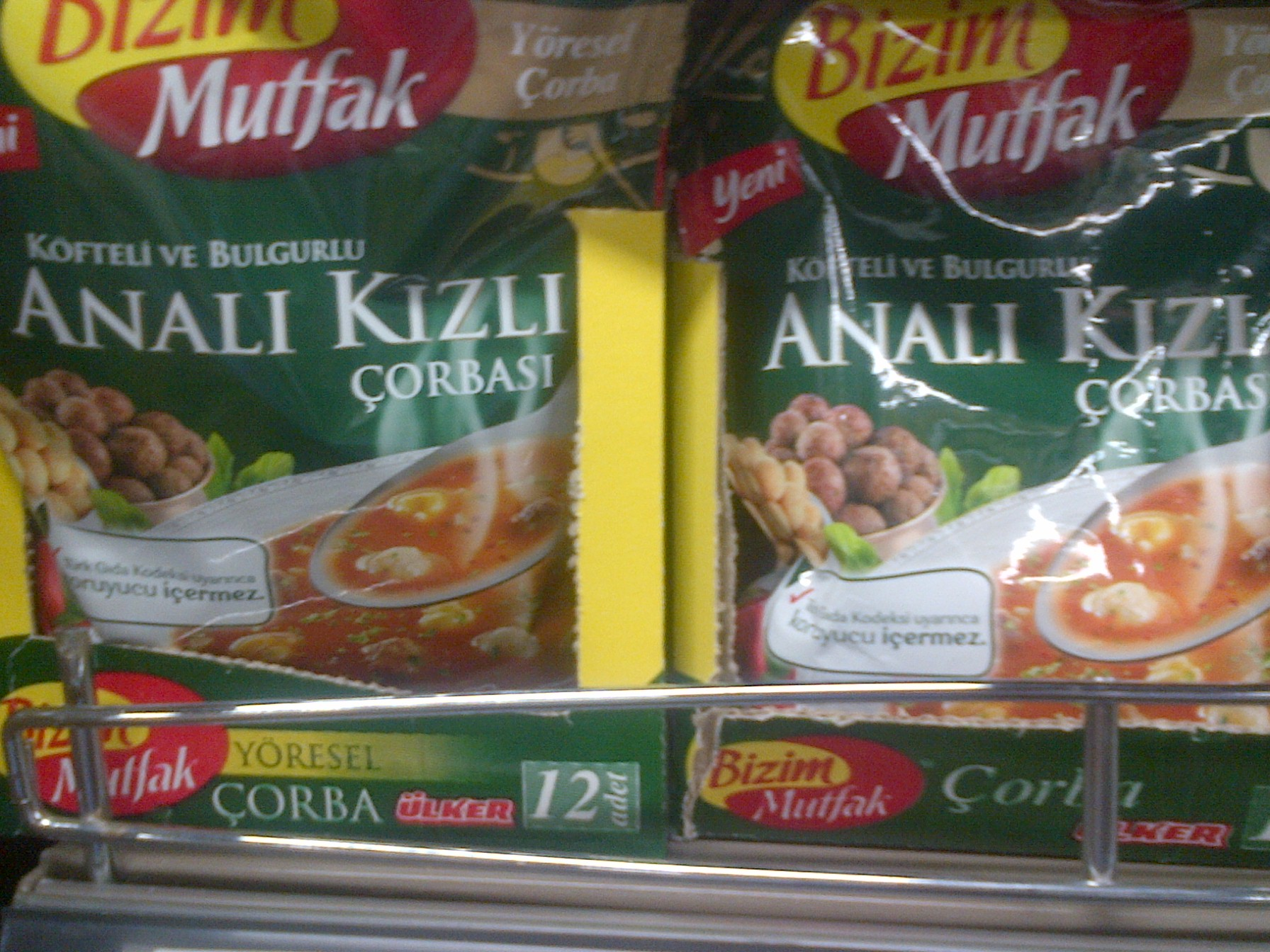 Analı kızlı çorbası (sopa "madre e hija") de la cocina turca, también se puede comprar pre-elaborada, en supermercados.